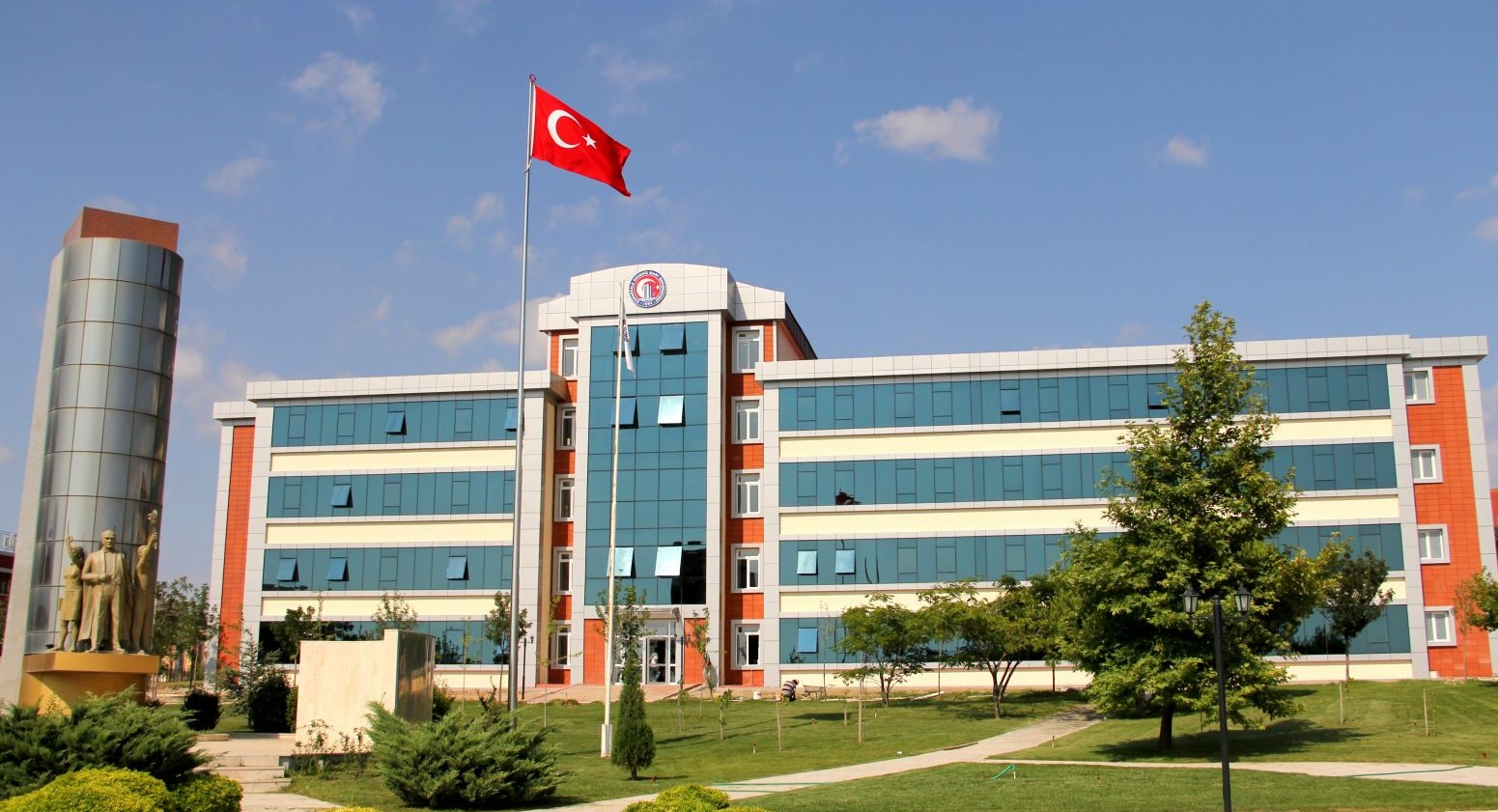 Çanakkale Siyasal fakülte binası ve önünde bulunan Bilim Anıtı.